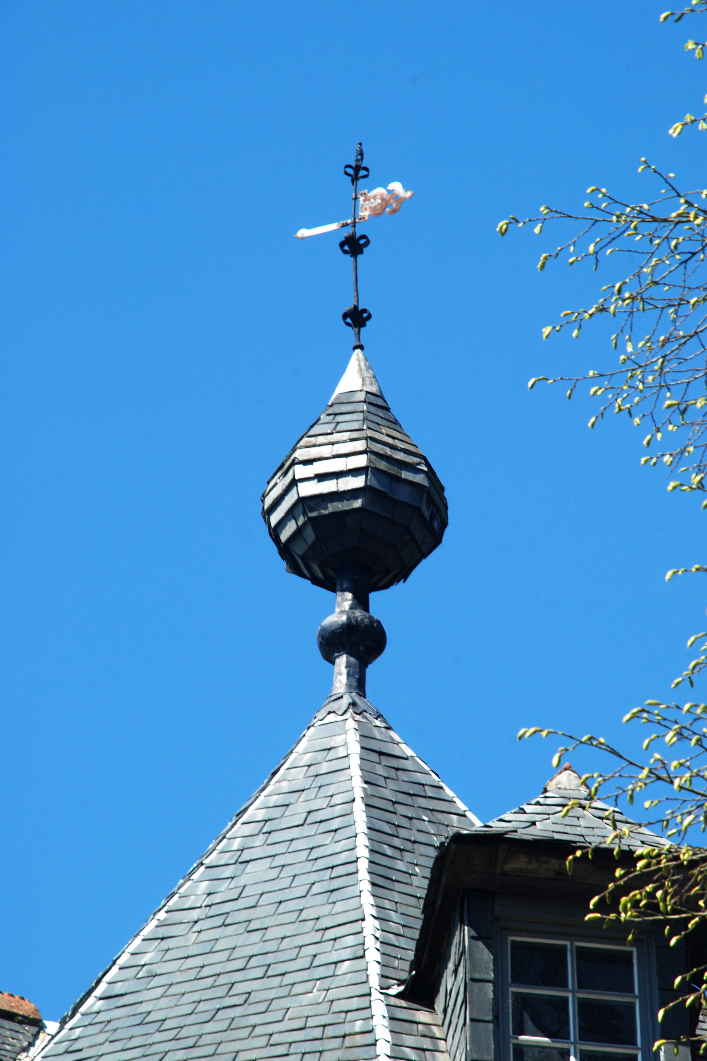 Belgique - Brabant flamand - Louvain - Première enceinte de Louvain - Waterpoort (derrière le Hollandcollege ou Paridaensinstituut)